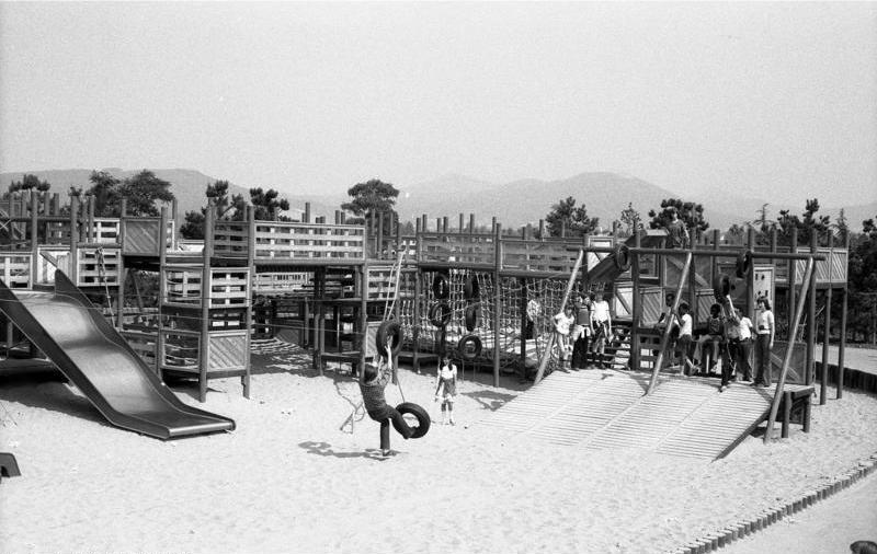 Bundesgartenschau in Bonn